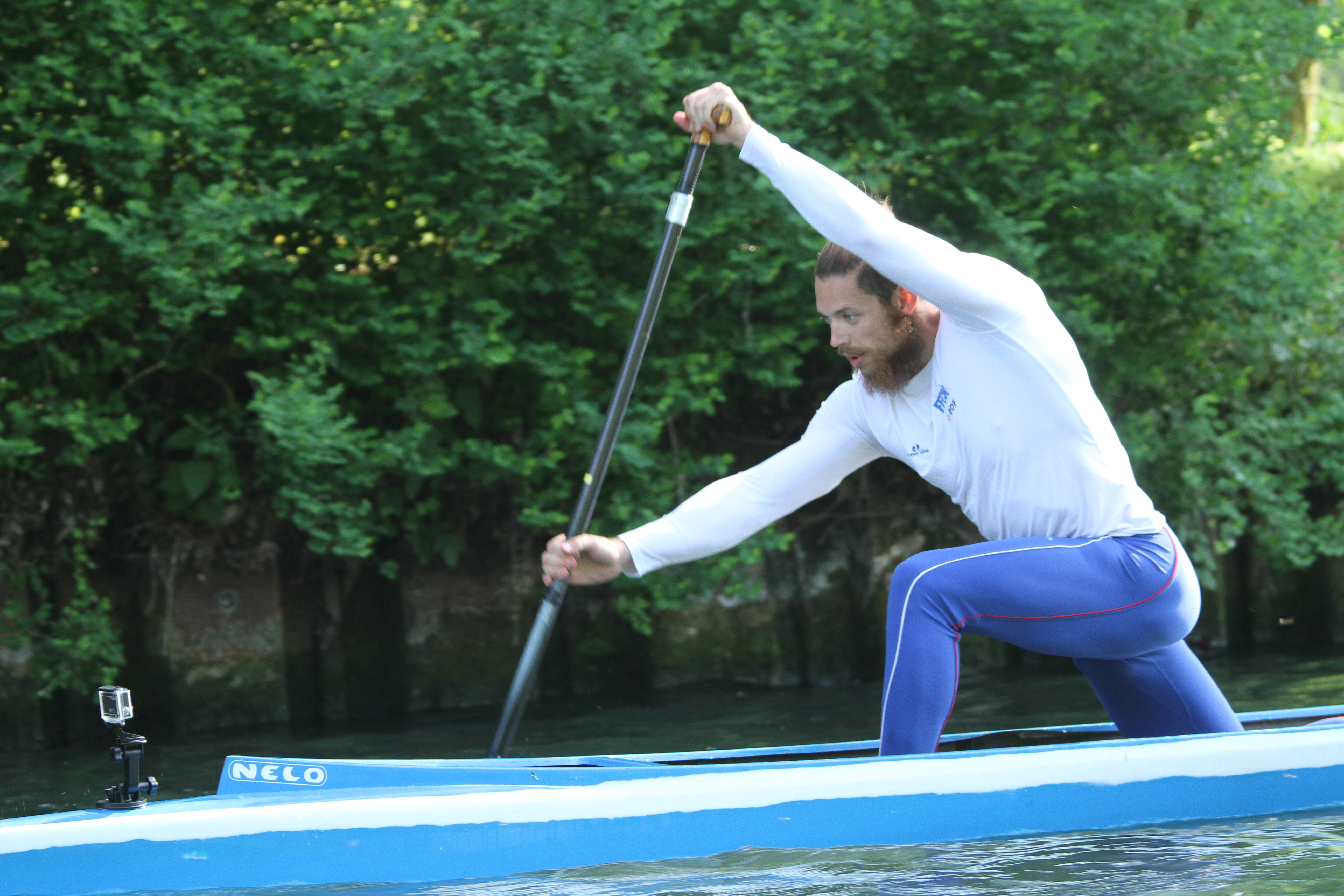 Adrien Bart en Canoë